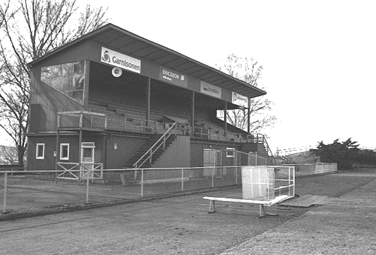 Kvarnbyvallen innan läktaren revs, mars 1993.